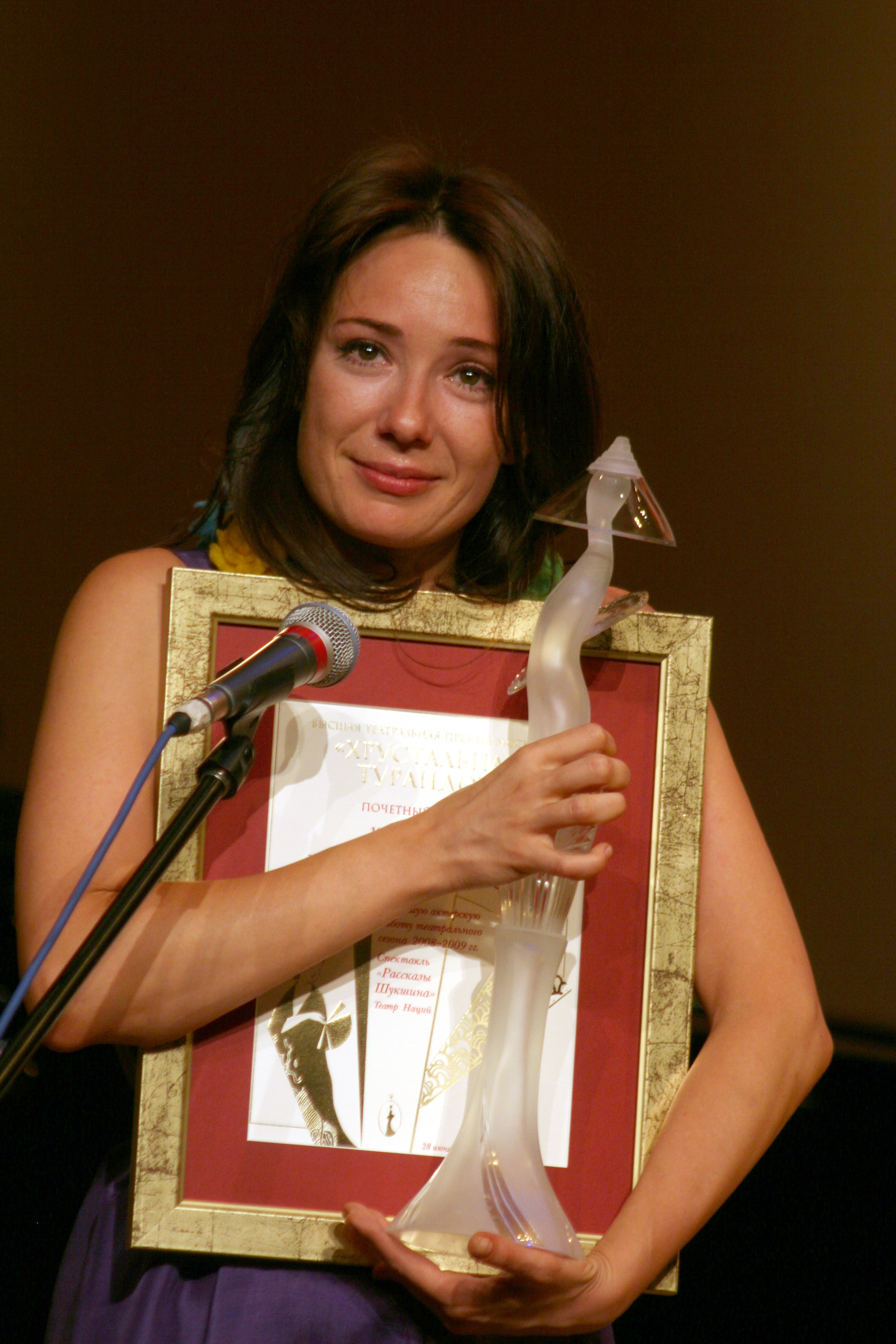 Чулпан Хаматова на вручении премии "Хрустальная турандот" в 2009 г.